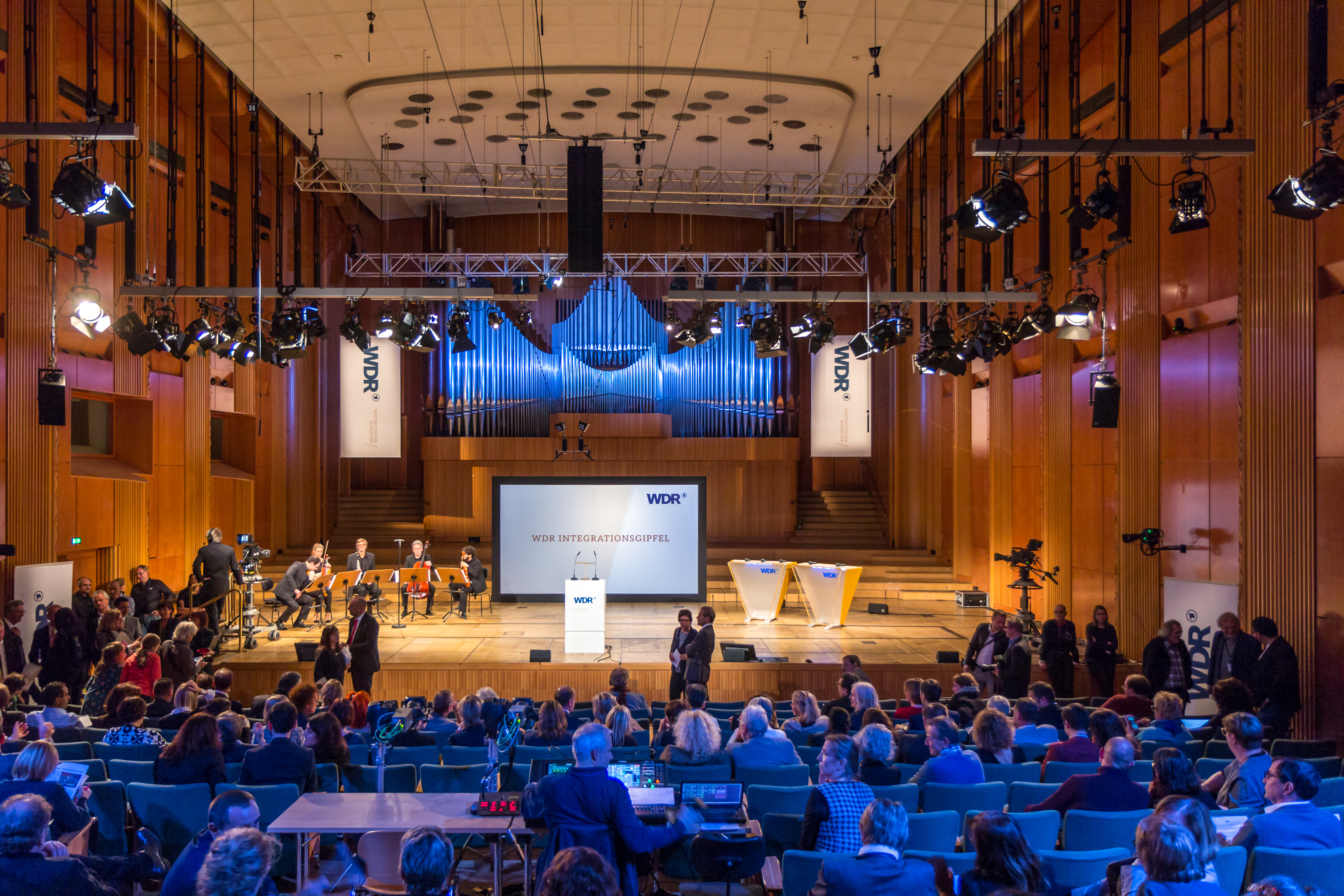 WDR Integrationsgipfel 2016 - 17:45 - Eröffnung der Abendveranstaltung und Verleihung des Verdienstkreuzes 1. Klasse des Verdienstordens der Bundesrepublik Deutschland an den scheidenden WDR-Integrationsbeauftragten Gualtiero Zambonini Foto: Großer Sendesaal (Klaus-von-Bismarcksaal) im WDR-Funkhaus am Wallrafplatz